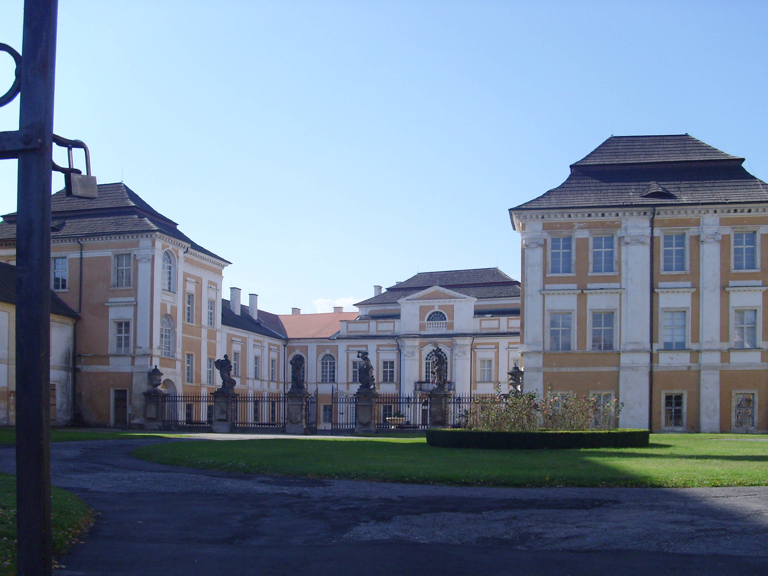 Front side od Duchcov castle in Duchcov in Czech Republic